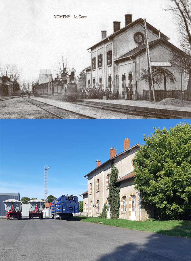 Bahnhof in Nomeny (France) ca. 1894 und 2019